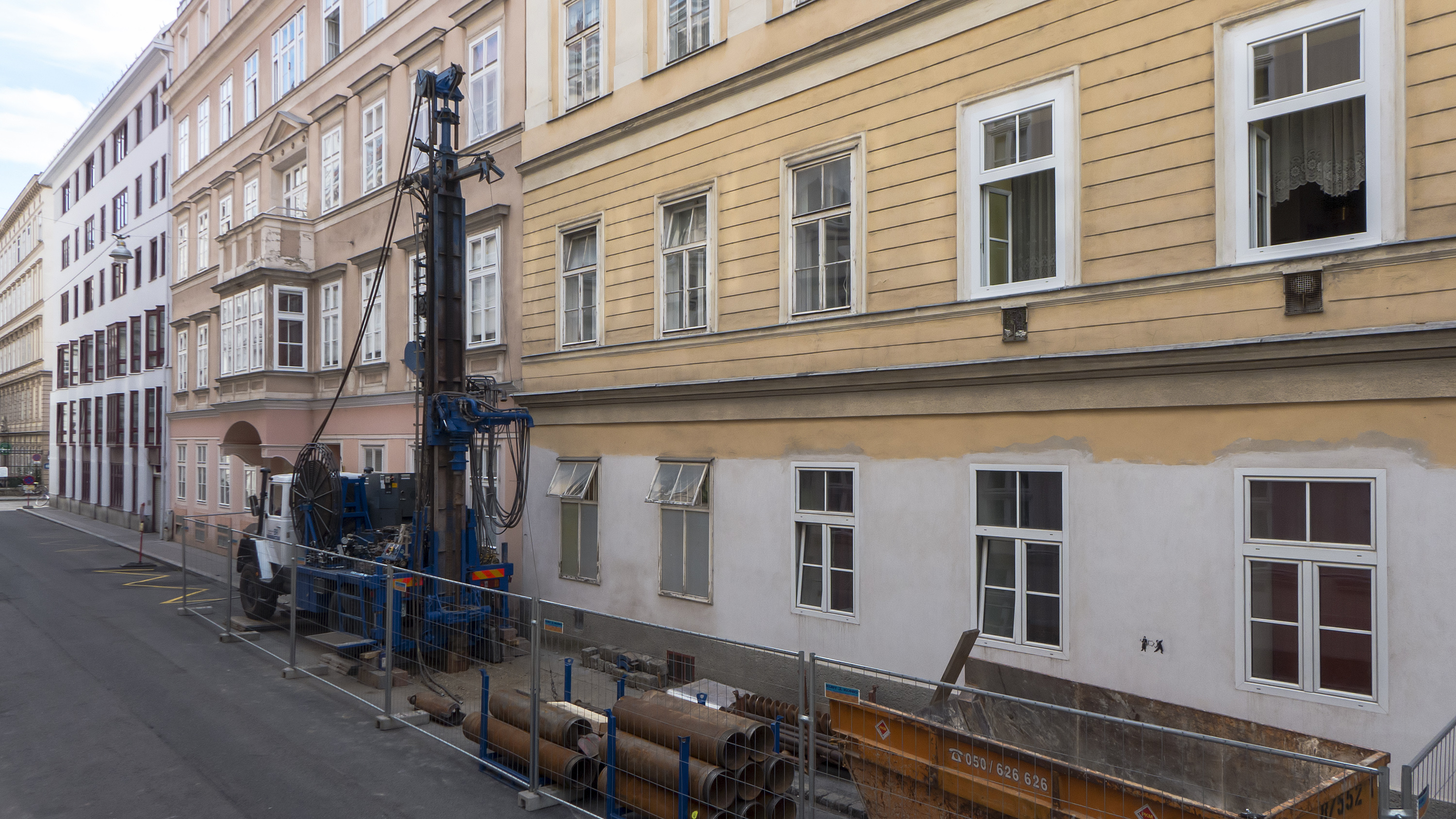 Probebohrung für die U-Bahn-Linie U5 in der Beethovengasse in Wien 9